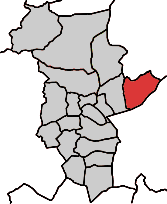 Situación da parroquia de Galgao no concello de Abadín